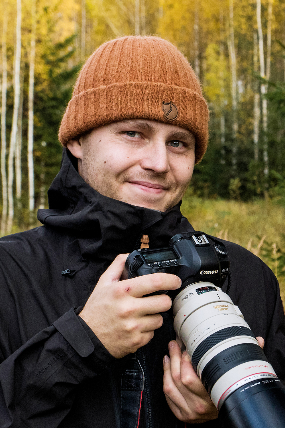 Loodusfotograafi Karl Adami portree.